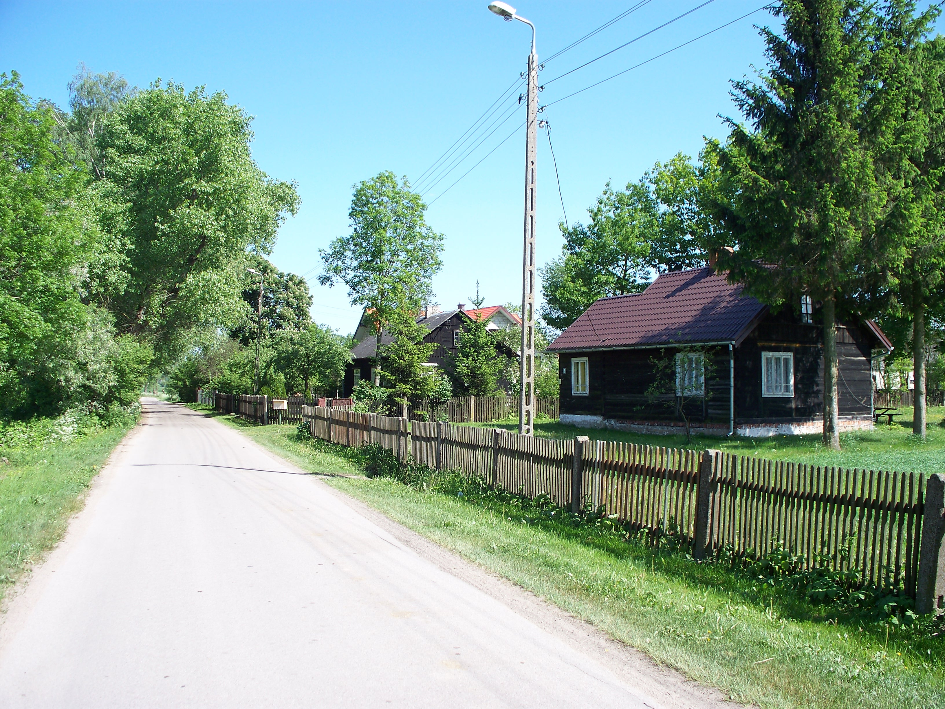 Zabudowa skupiona jest wokół jednej drogi, w układzie kalenicowym